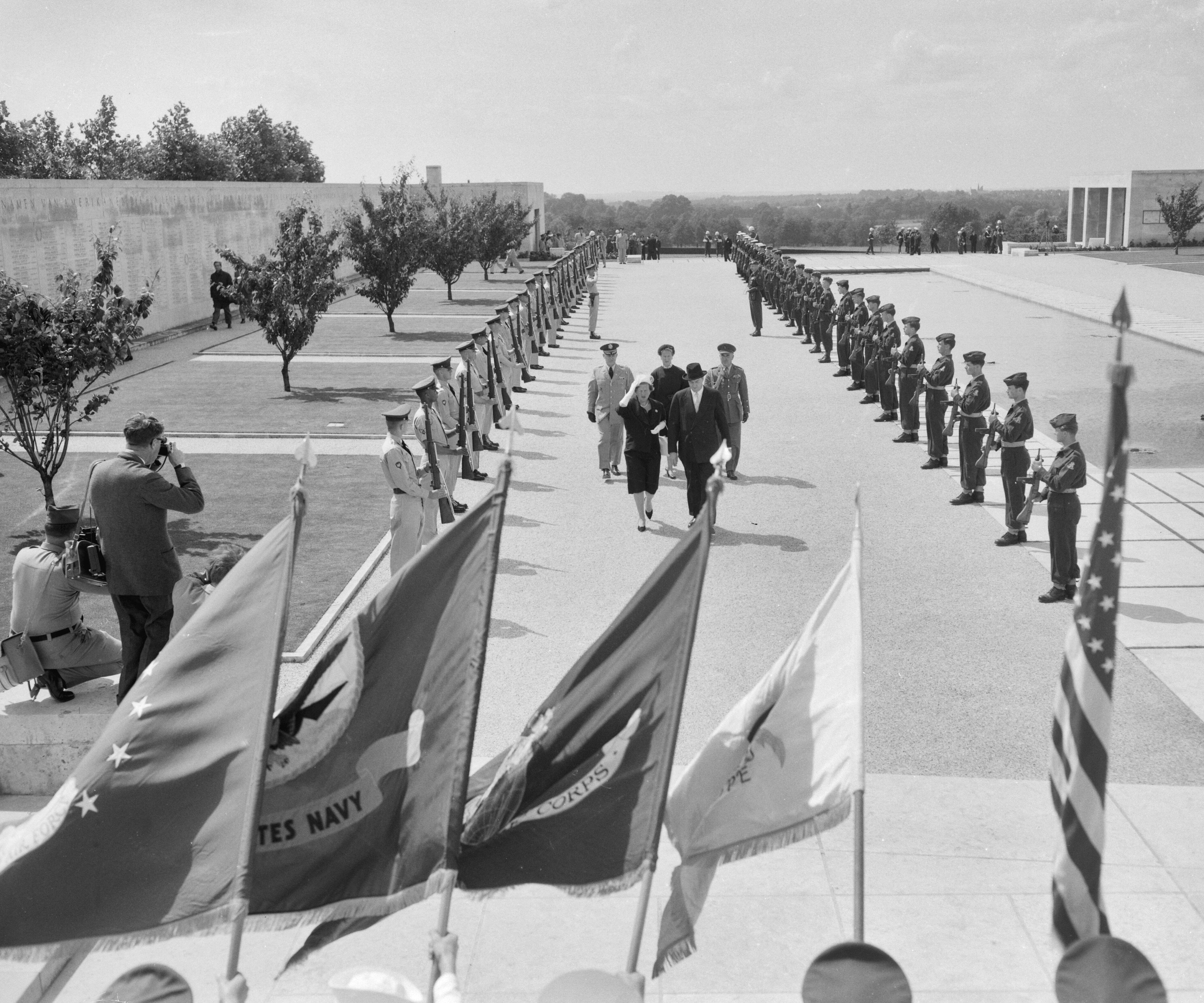 Collectie / Archief : Fotocollectie Anefo Reportage / Serie : [ onbekend ] Beschrijving : Amerikaanse begraafplaats te Margraten, officieel ingewijd Datum : 7 juli 1960 Locatie : Margraten Trefwoorden : begraafplaatsen Fotograaf : Bilsen, Joop van / Anefo Auteursrechthebbende : Nationaal Archief Materiaalsoort : Negatief (zwart/wit) Nummer archiefinventaris : bekijk toegang 2.24.01.04 Bestanddeelnummer : 911-4051